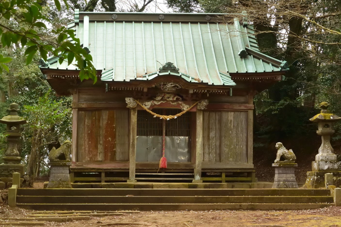 大福山の山頂にある、日本武尊を祭った白鳥神社。